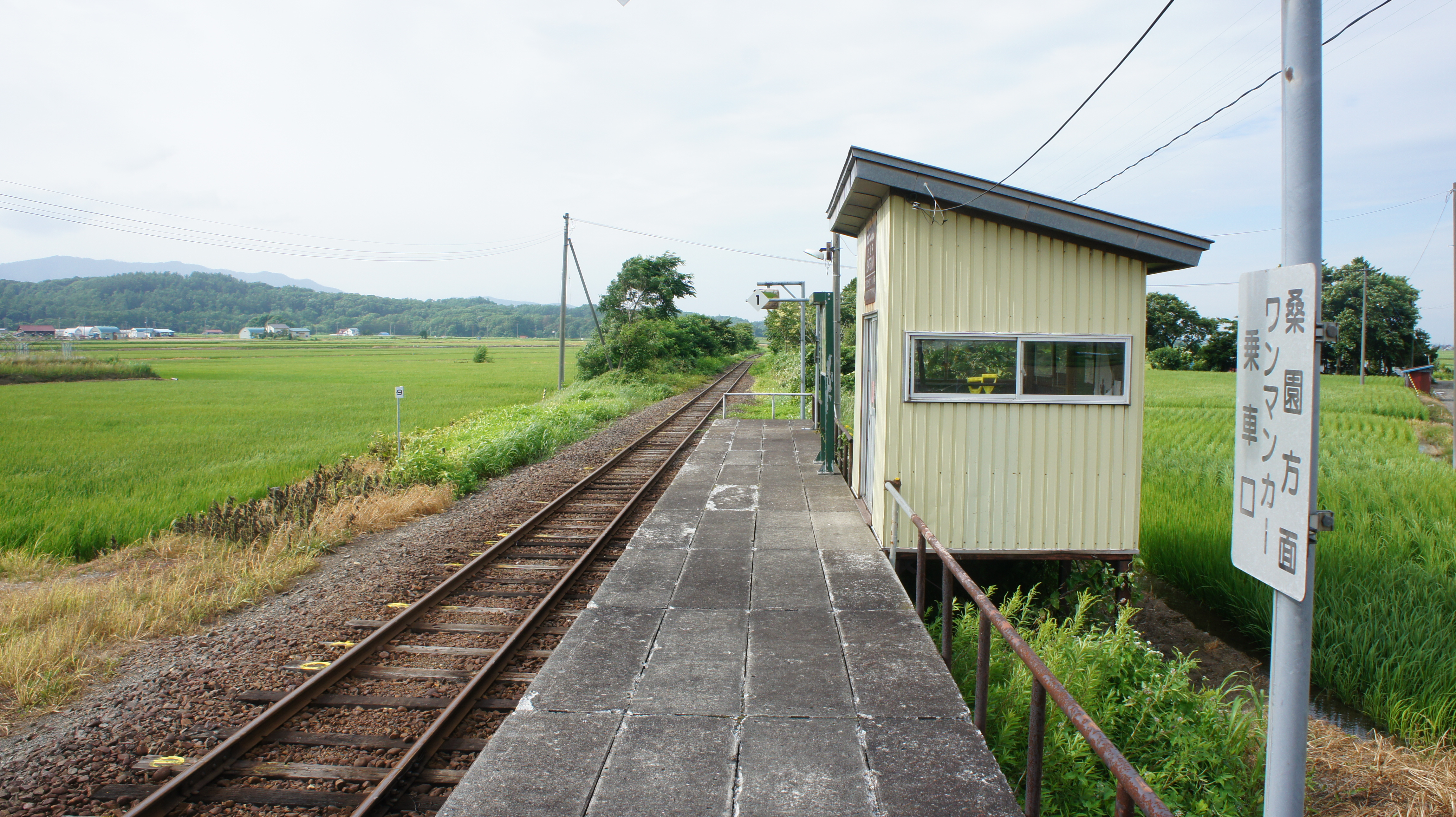 JR札沼線・於札内駅のホーム